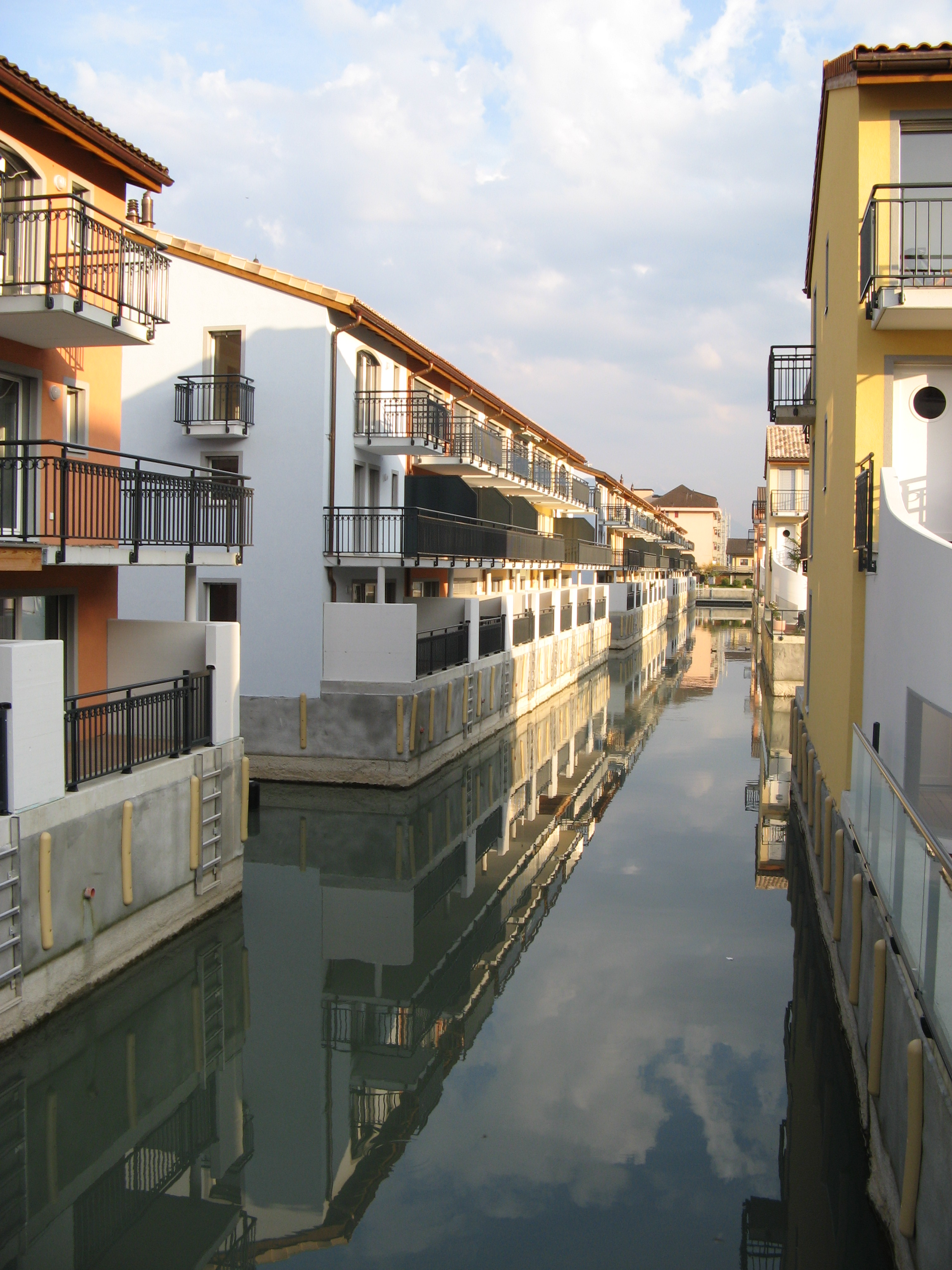 Le Bouveret, Valais, Switzerland.